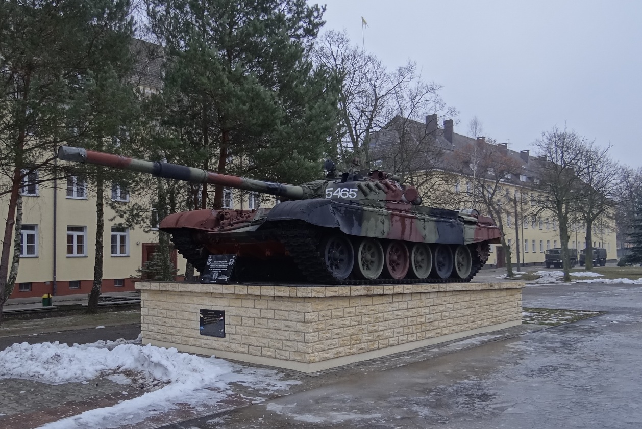 Pomnik umieszczony na cokole czołg T-72.upamiętniający żołnierzy i pracowników 6BKPanc.